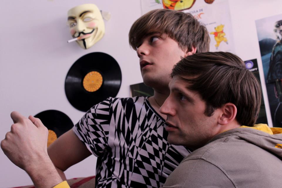 Foto de Jaime Riba